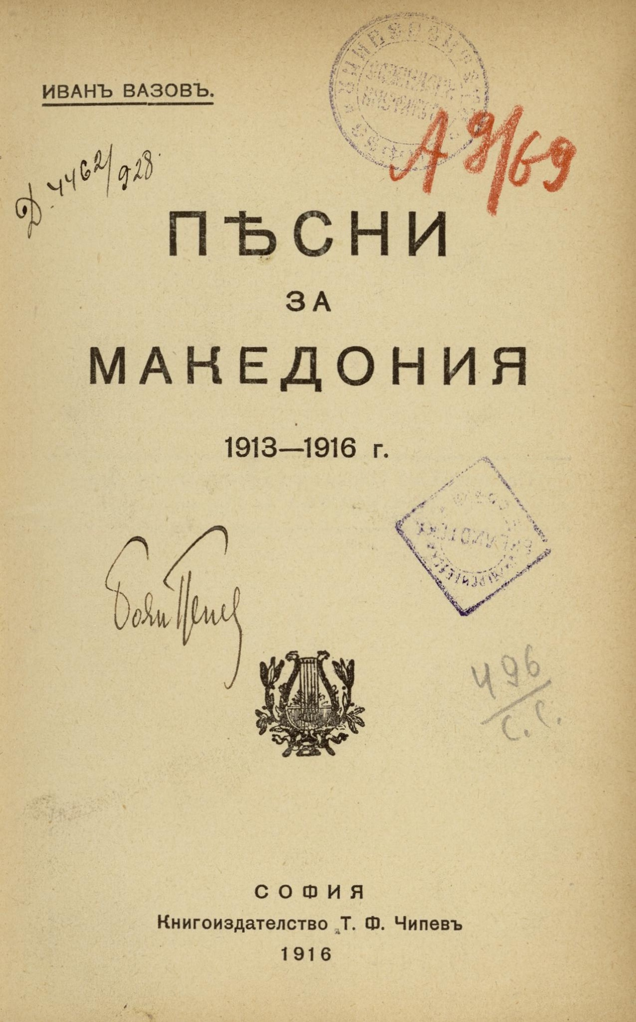 Началната страница на стихосбирката на Иван Вазов „Песни за Македония“.